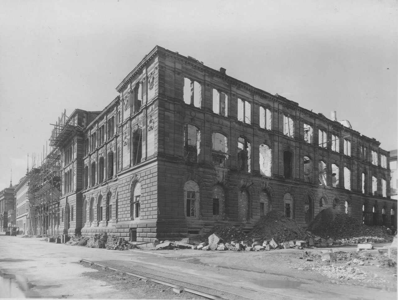 Zerstörtes Gebäude der HFT Stuttgart